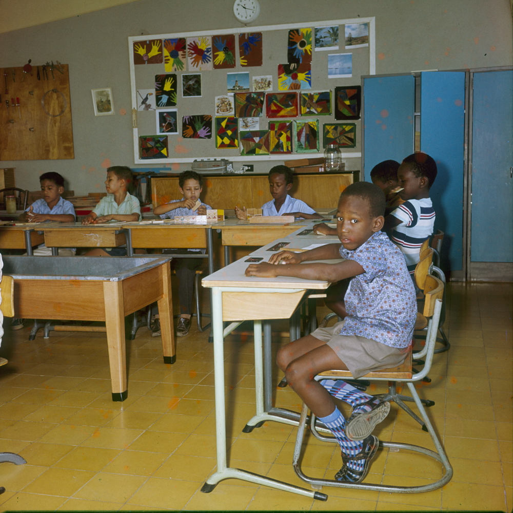 Dia.